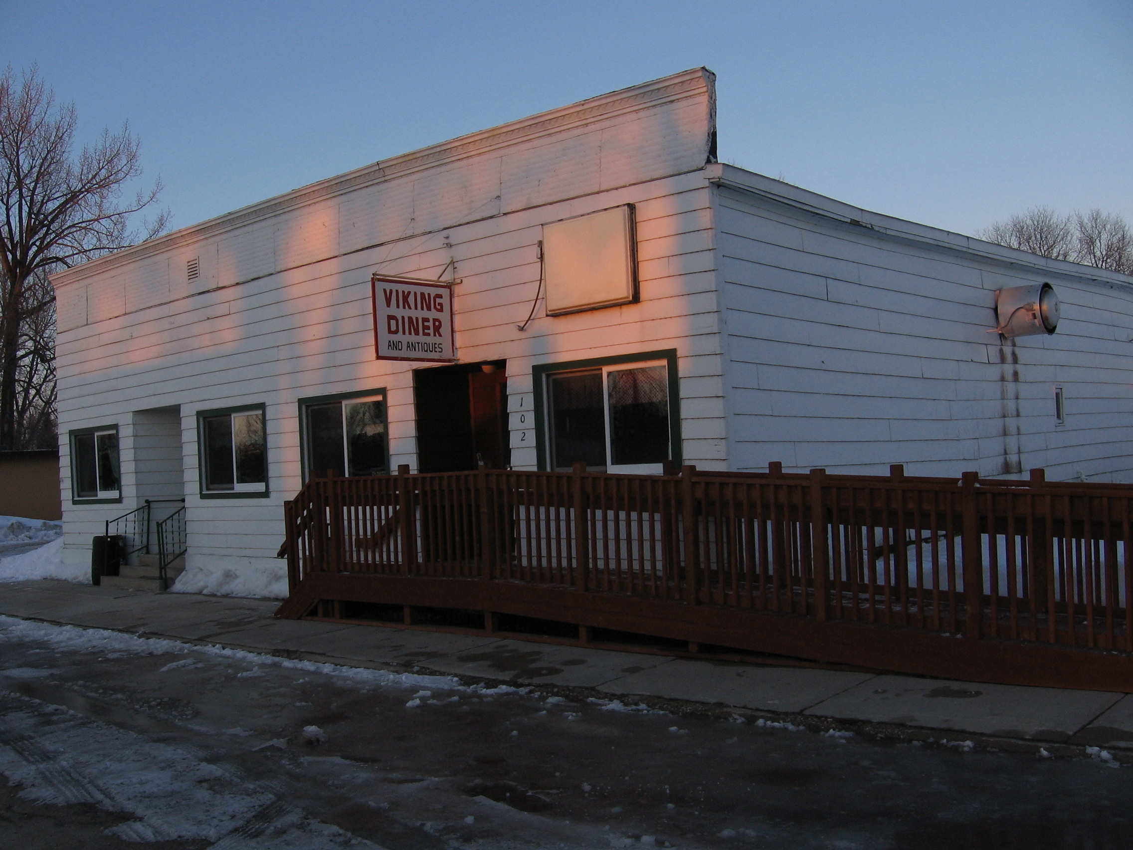 Viking Diner and Antiques Viking, Minnesota